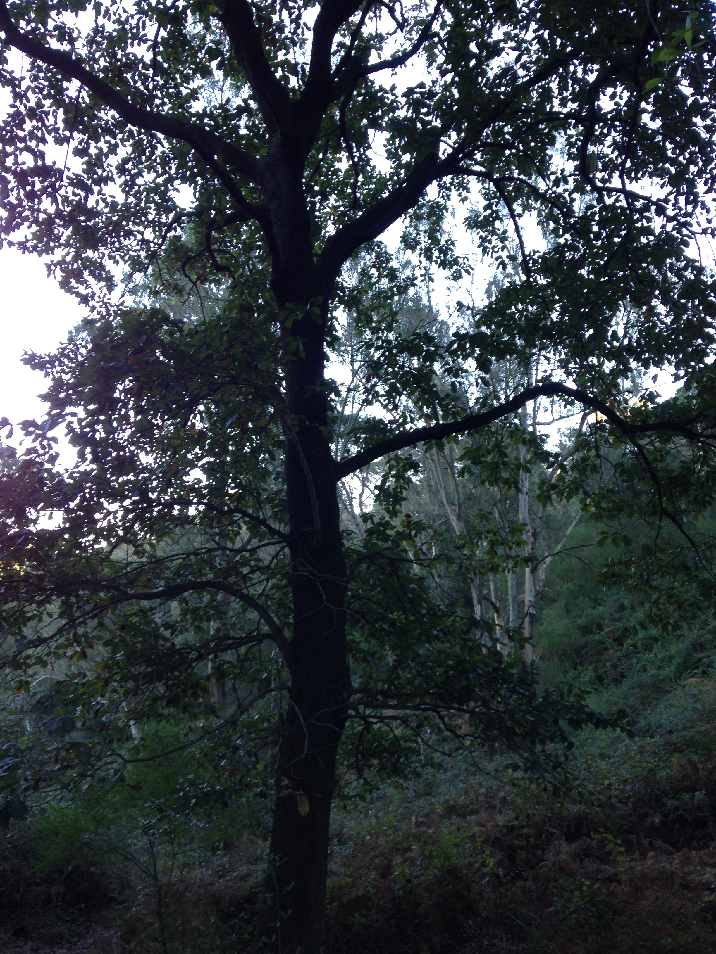 Quejigo Moruno o Roble andaluz (quercus canariensis) de la fuente de los perros) en Ceuta (Garcia Aldave) This is a photography of a Special Area of Conservation in Spain with the ID: ES6310001. Natura2000 entry, EEA entry